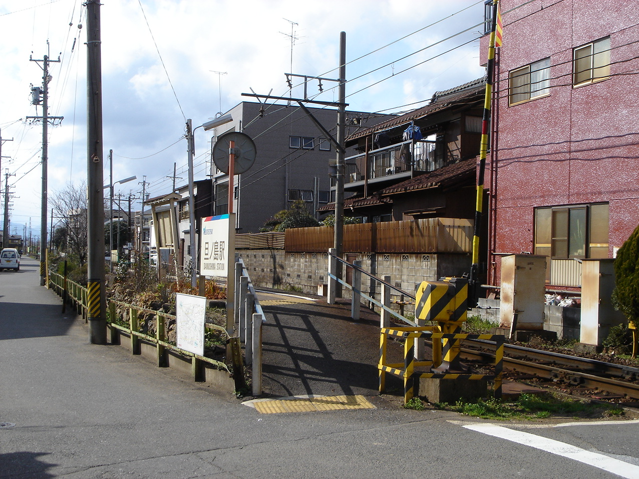 Dannoshima Station(旦ノ島駅),(廃線となる前の名鉄揖斐線),Gifu,Gifu,Japan(岐阜県岐阜市)で撮影